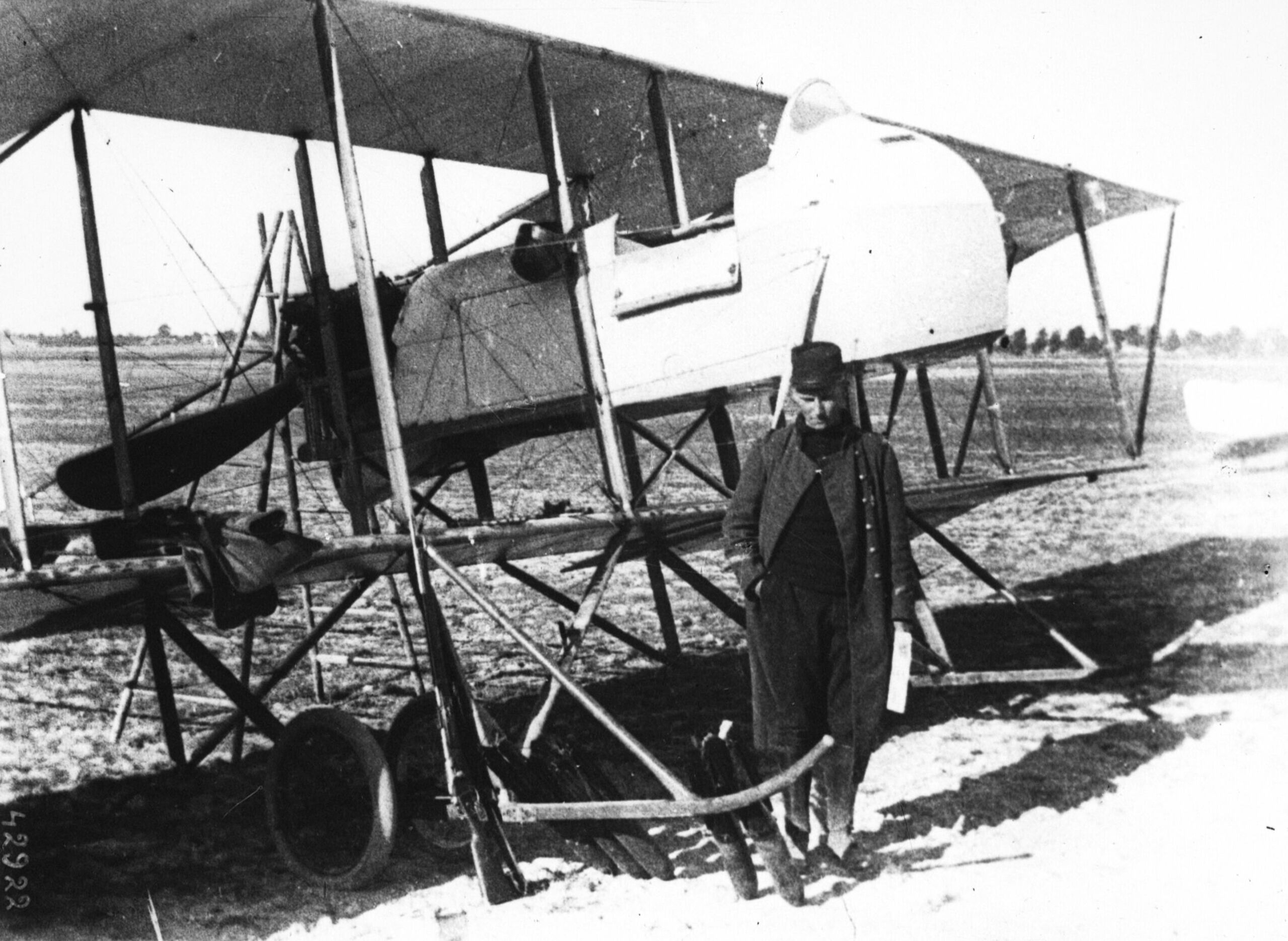 L'aviateur Marcel Brindejonc des Moulinais (1892-1916) s'apprêtant à partir en reconnaissance. À ses pieds, les cinq bombes qu'il va lancer.